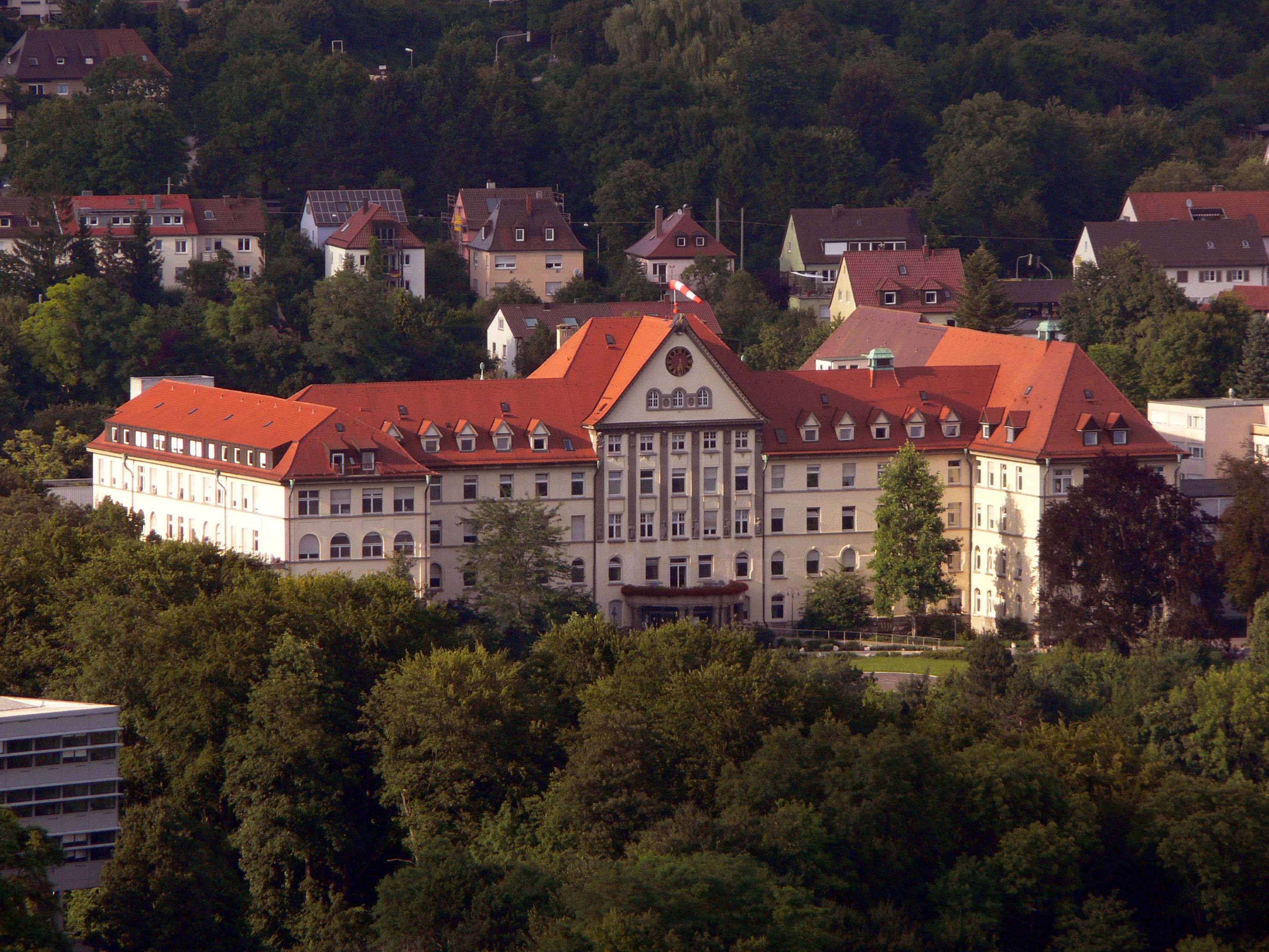 Steinhövelstraße 9, Hauptgebäude der Ulmer Klinik auf dem Safranberg, Kulturdenkmal; errichtet 1909/1912 von Stadtbaurat Karl Romann (Diplomarbeit: Gansloser, Sandra: Nachnutzung Klinikareal Safranberg Stadt Ulm)